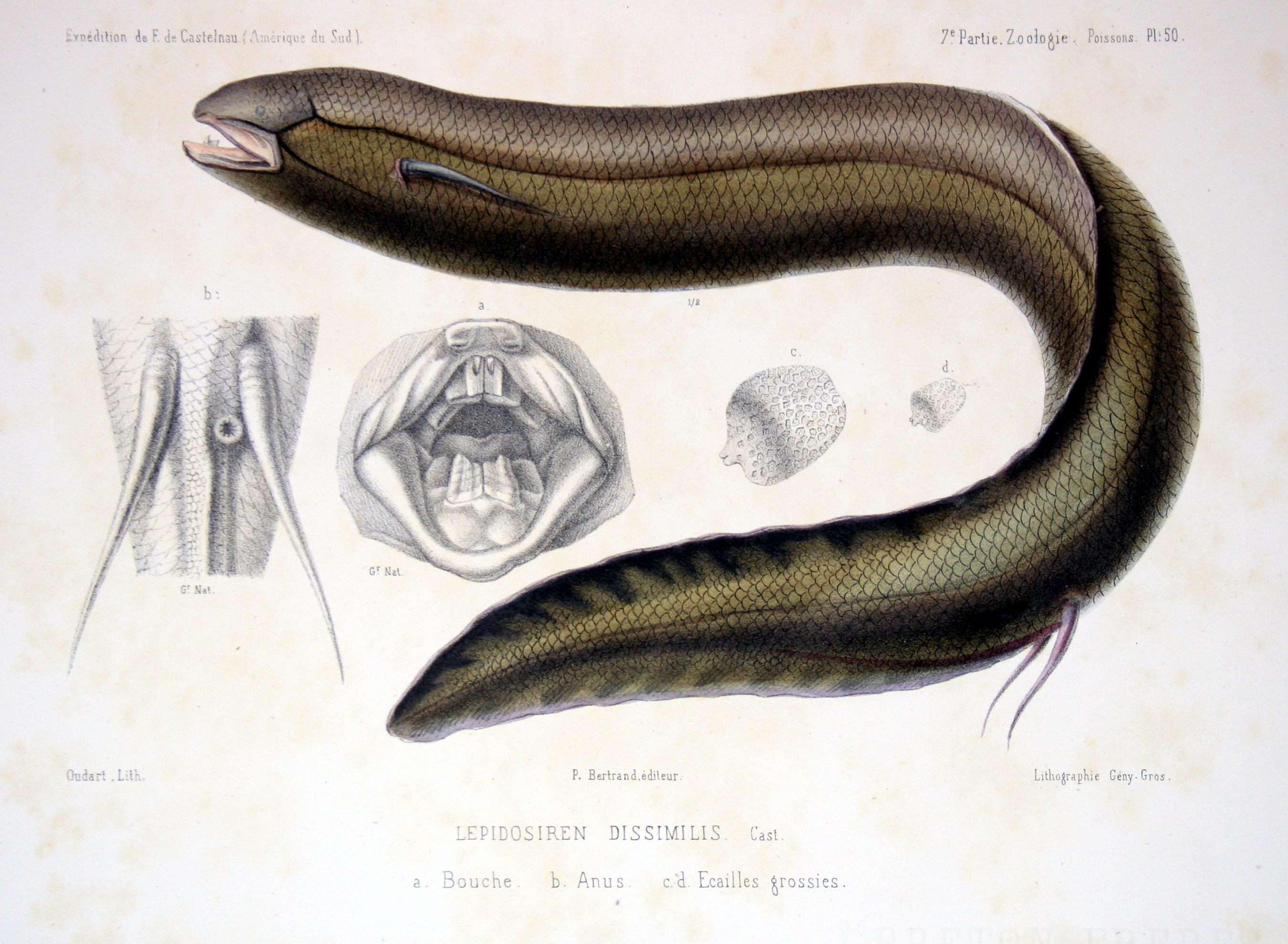 Lepidosiren dissimilis = Lepidosiren paradoxa (a: mouth, b: anus, c,d: scales)